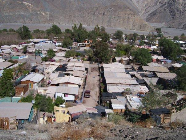 vista de un campamento chileno